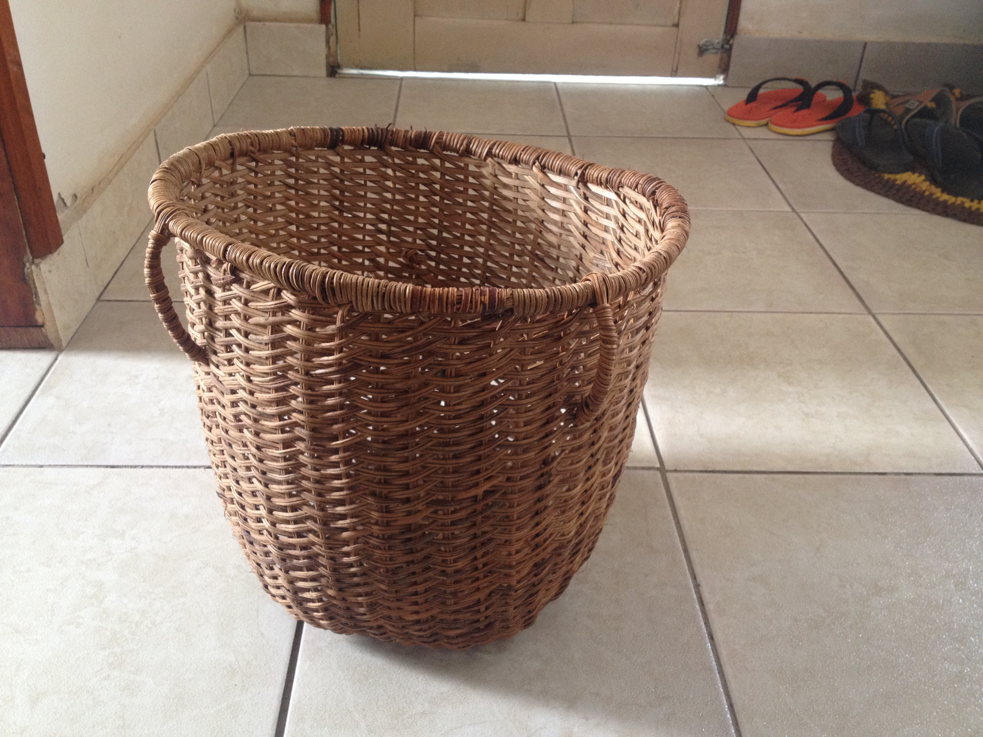 Cesto de Aturá, utilizado até os dias de hoje pelos moradores daquela região. Ele é feito de um citpó chamado ambé, bastante abundante dentro das matas local.